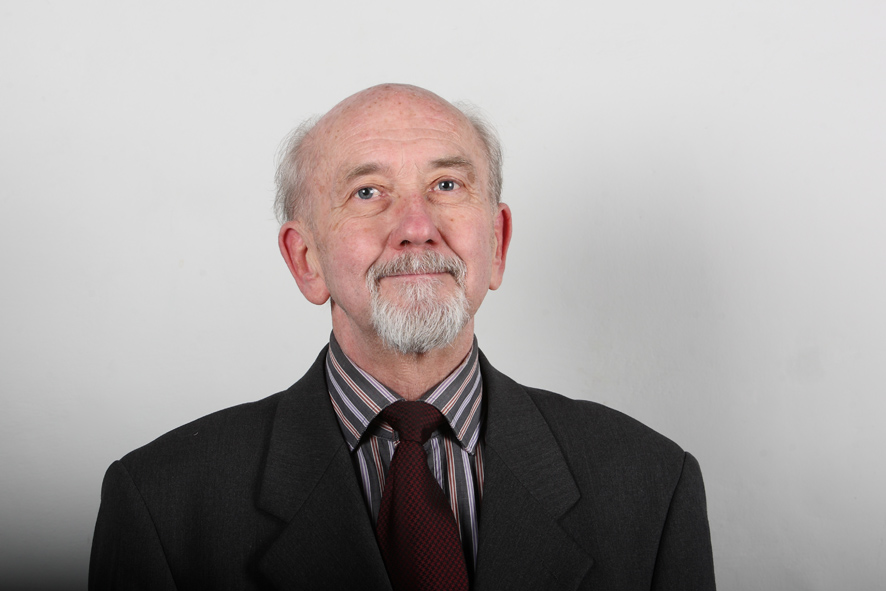 Arvi Aasmaa